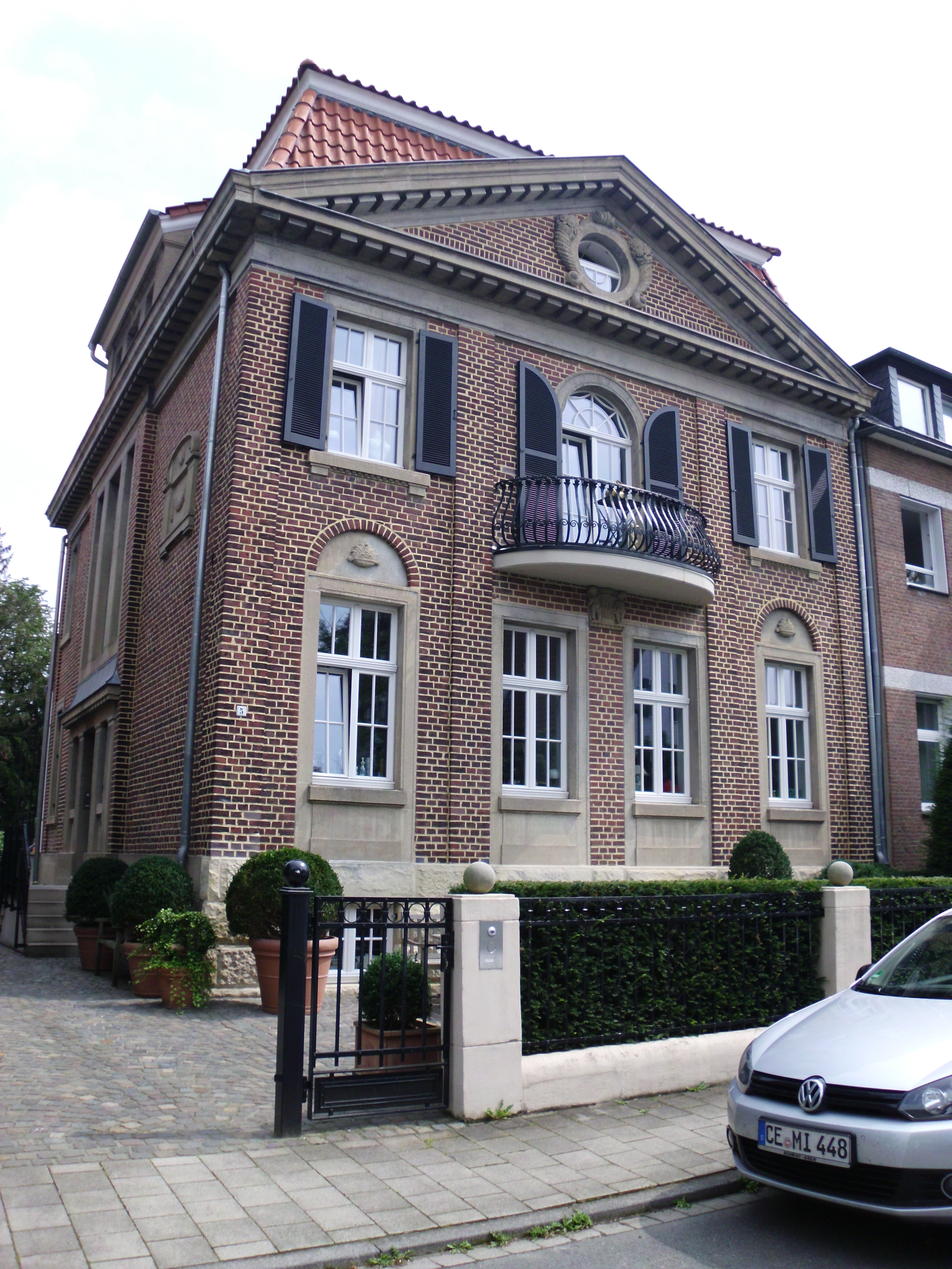 Das Corpshaus der Gustphalia Halle in Münster